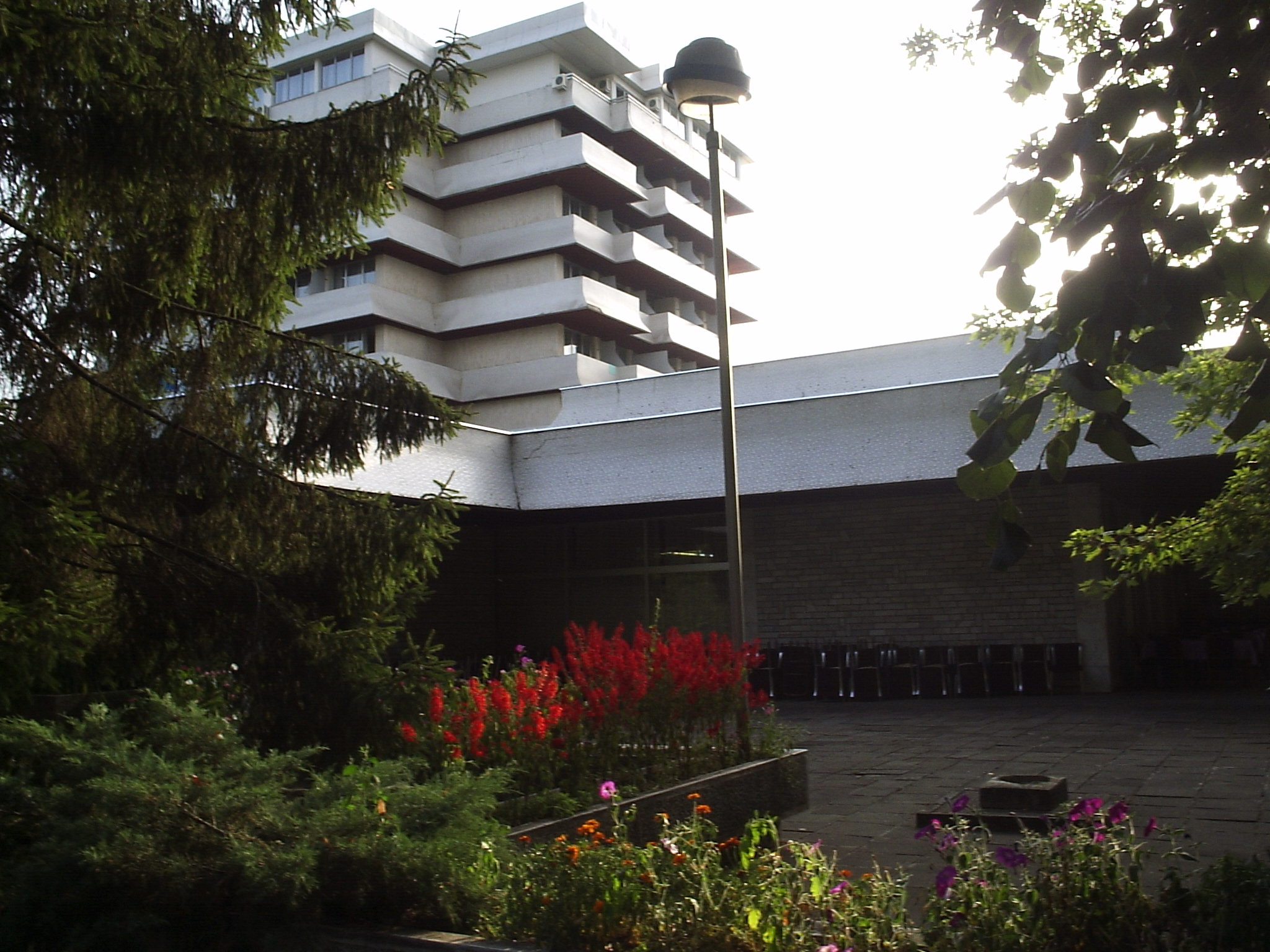 Mataruška banja hotel